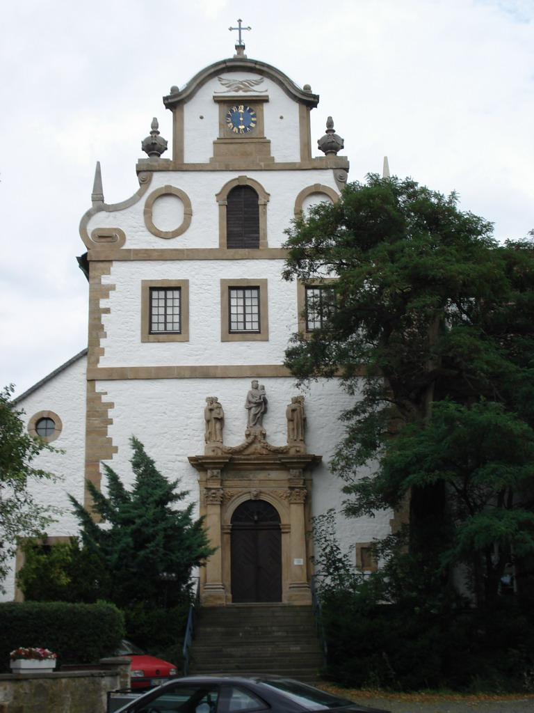 Die kath. Abdon-und-Sennen-Kirche in SZ-Ringelheim (Schlosskirche)